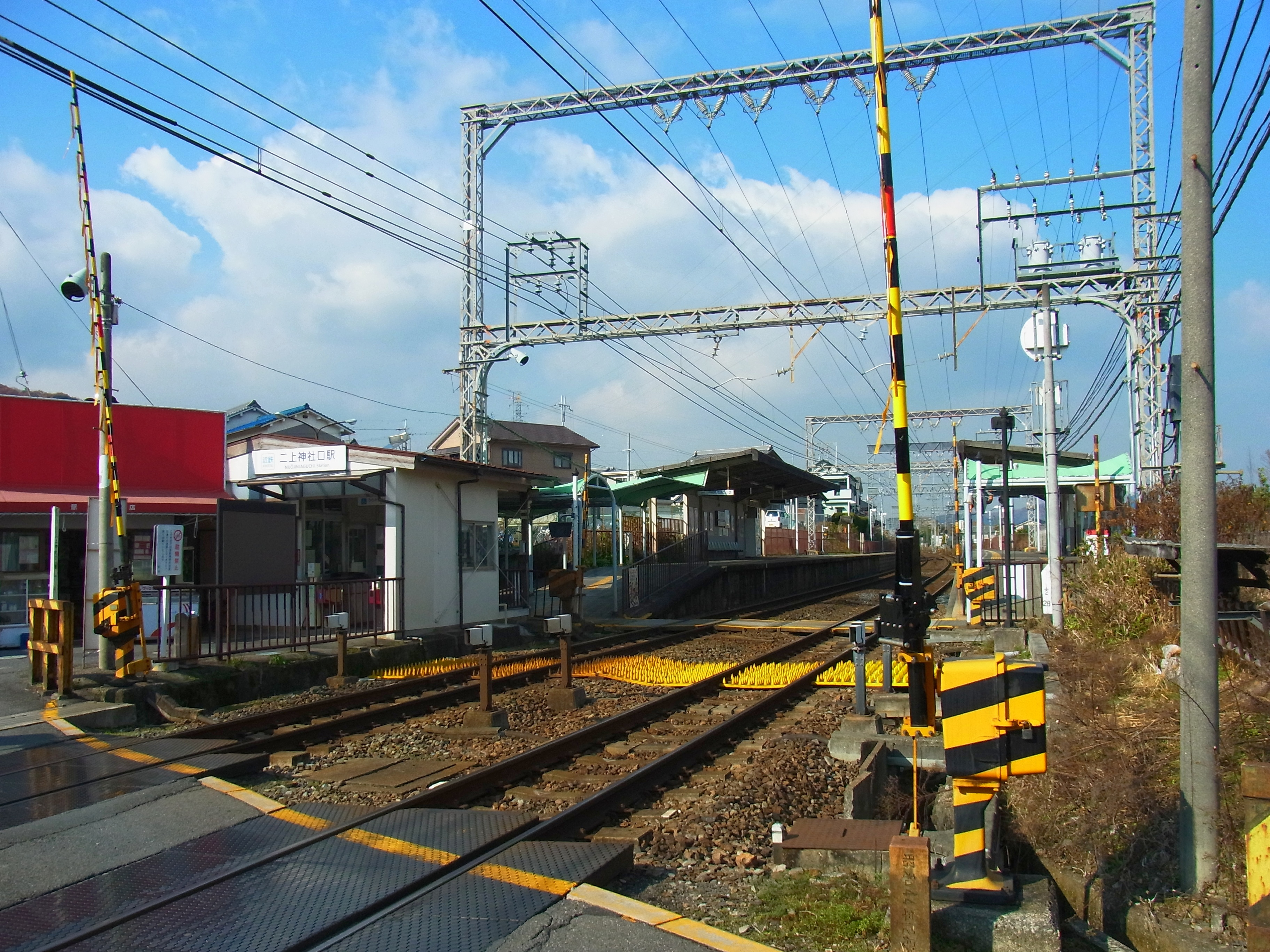 近鉄南大阪線 二上神社口駅 Nijōjinjaguchi station, Kintetsu Minami-Ōsaka line